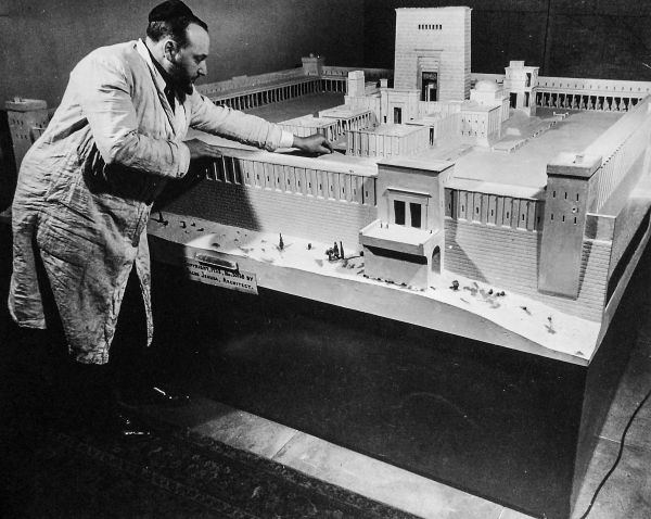 יעקב יהודה עם דגם המקדש שבנה בביתן הארצישראלי בניו יורק